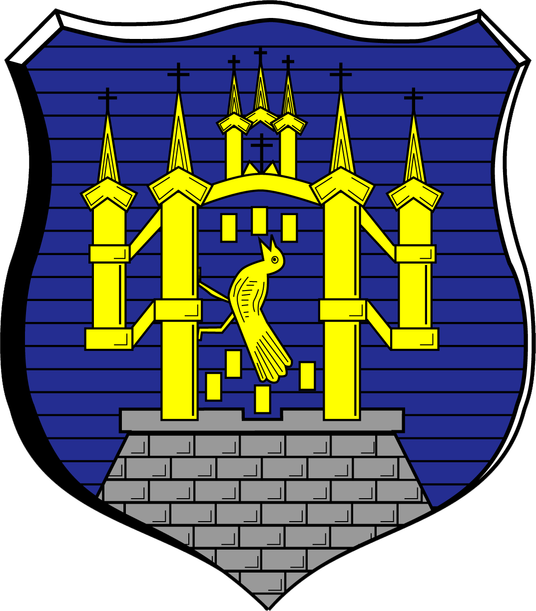 Wappen von HaigerDigitalumsetzung: Ansgar Wehnge